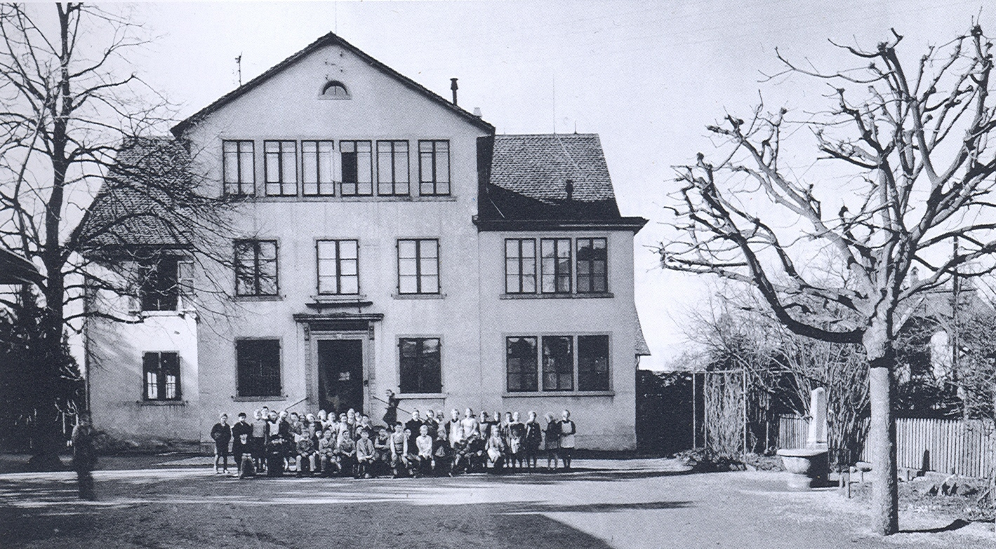 Zollikon 1920: Schulhaus Chirchhof